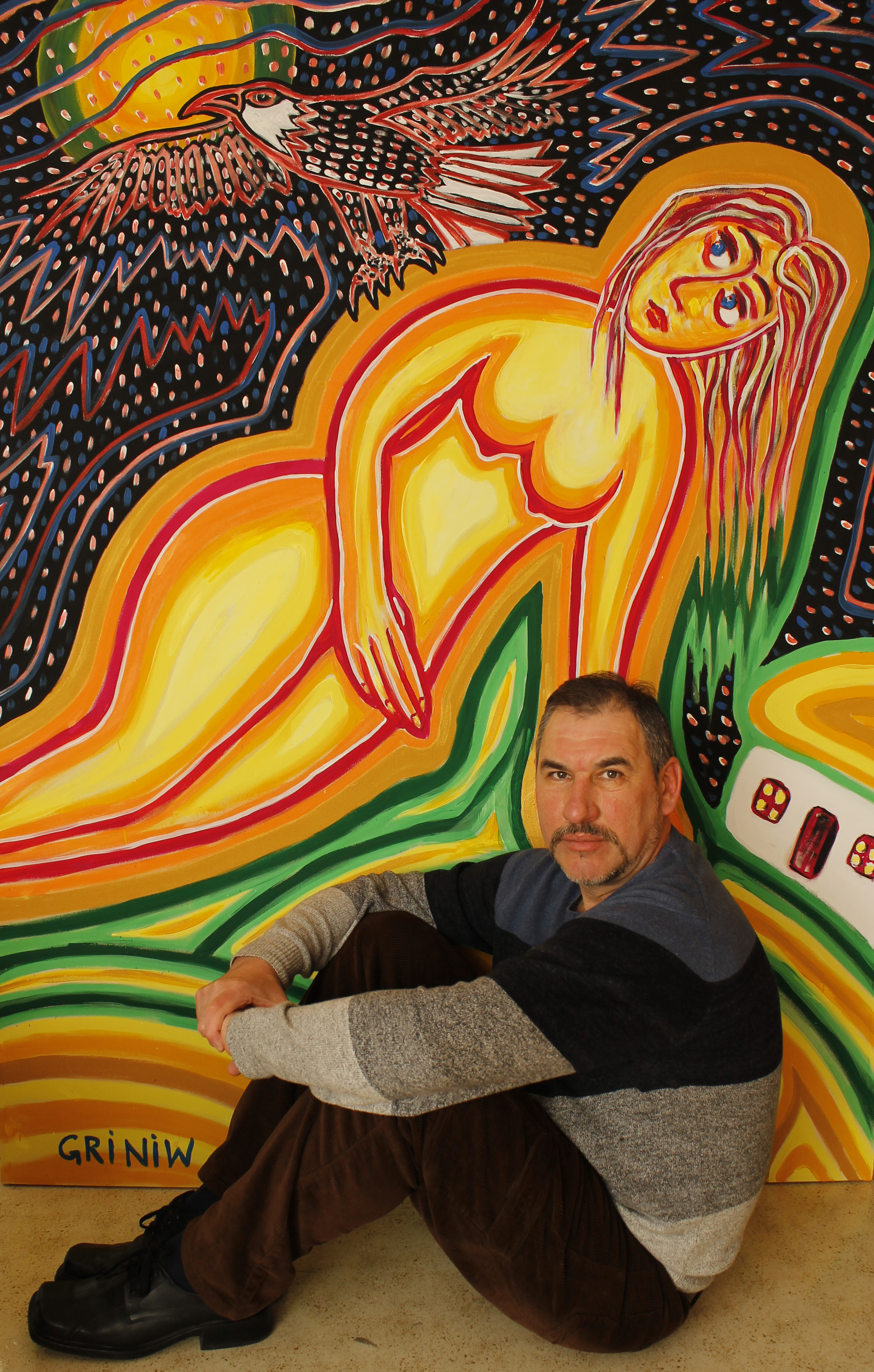 Ukraine